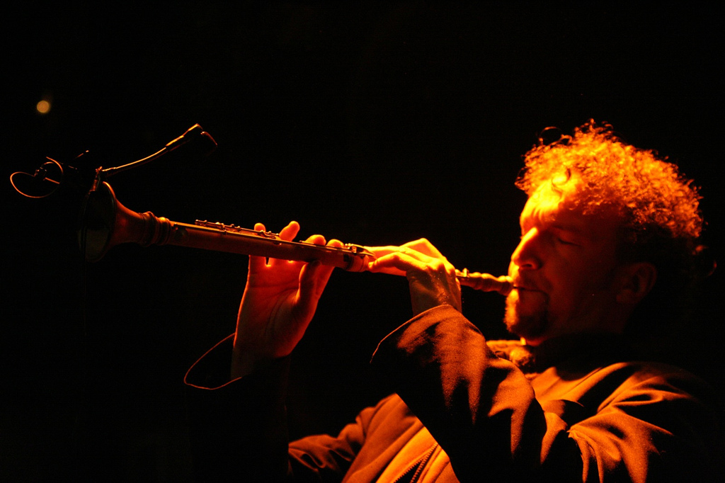 David Pasquet, sonneur de bombarde et joueur de clarinette (photo prise à Callac le 17 février 2007).